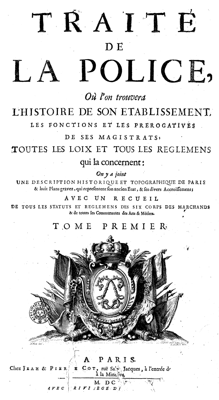 Traité de la Police (vol. I, 1707) par Nicolas de La Mare (1639-1723)